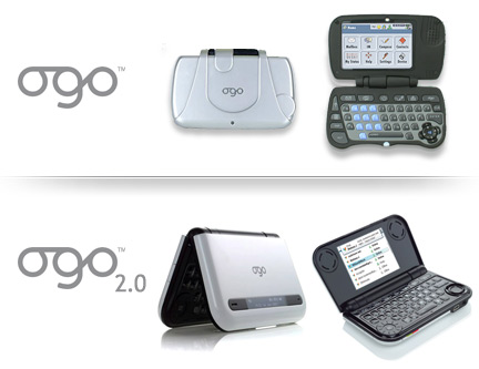 דגמי Ogo